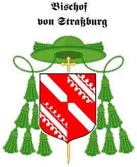 Wappen der Bischöfe von Straßburg ab 1359